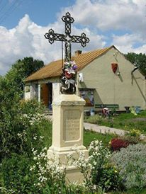 За часів керування парафією священиком Іваном Михайловським в Черничині, на перехресті доріг Метелін-Городок та Грубешів-Долгобичів поставили придорожний хрест з написом «СПАСИ ГОСПОДИ ЛЮДИ ТВОЯ 19 ОКТЯБР 1905».